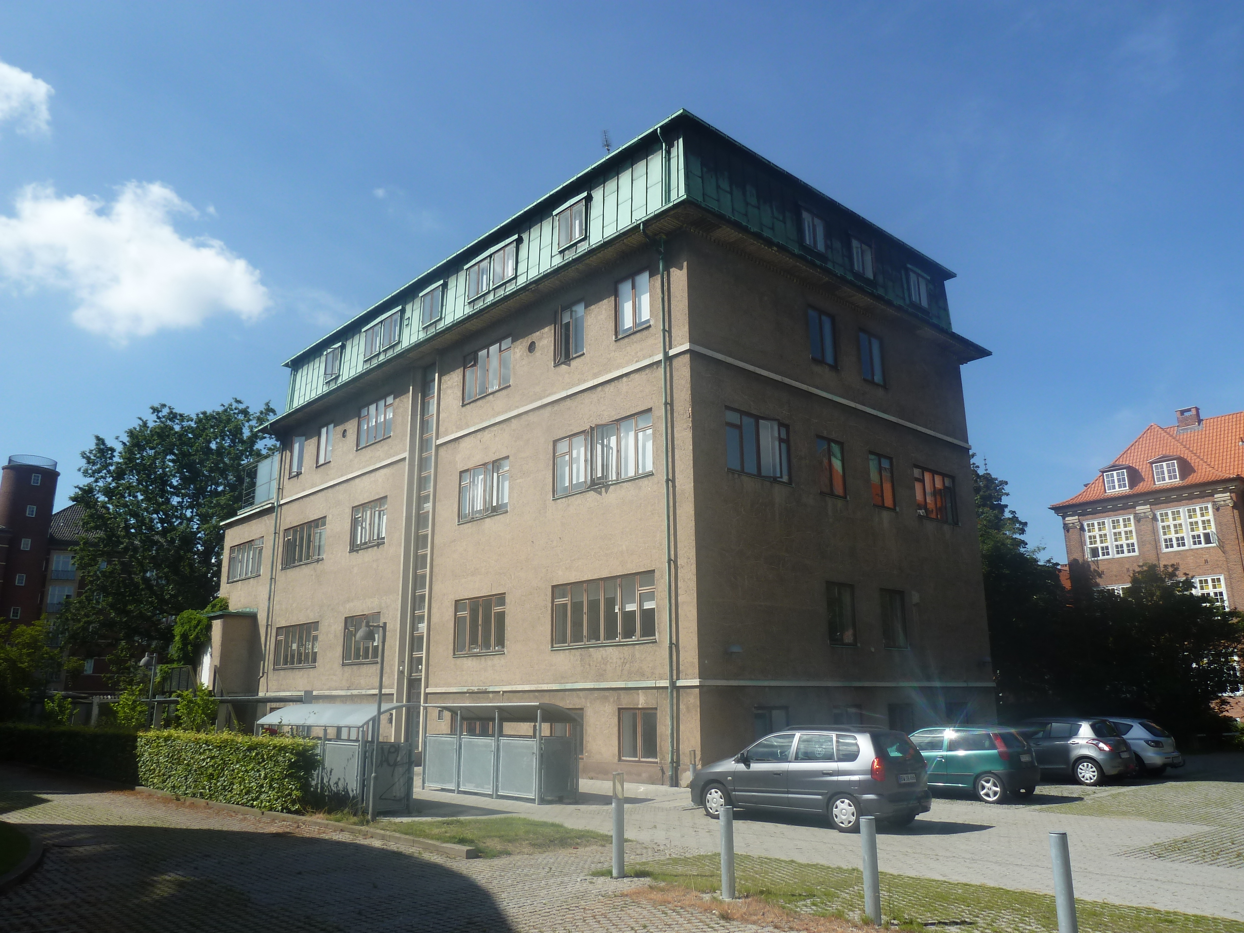 Fakultetssekretariatet, Det Naturvidenskabelige Fakultet in Østerbro, Copenhagen.